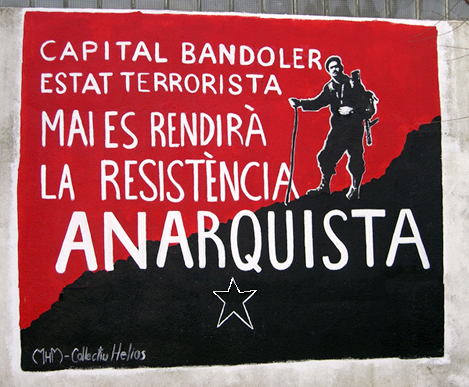 mural-graffiti en una pared del cementerio donde se encuentra la tumba de Quico Sabaté (Sant Celoni, Cataluña, España)